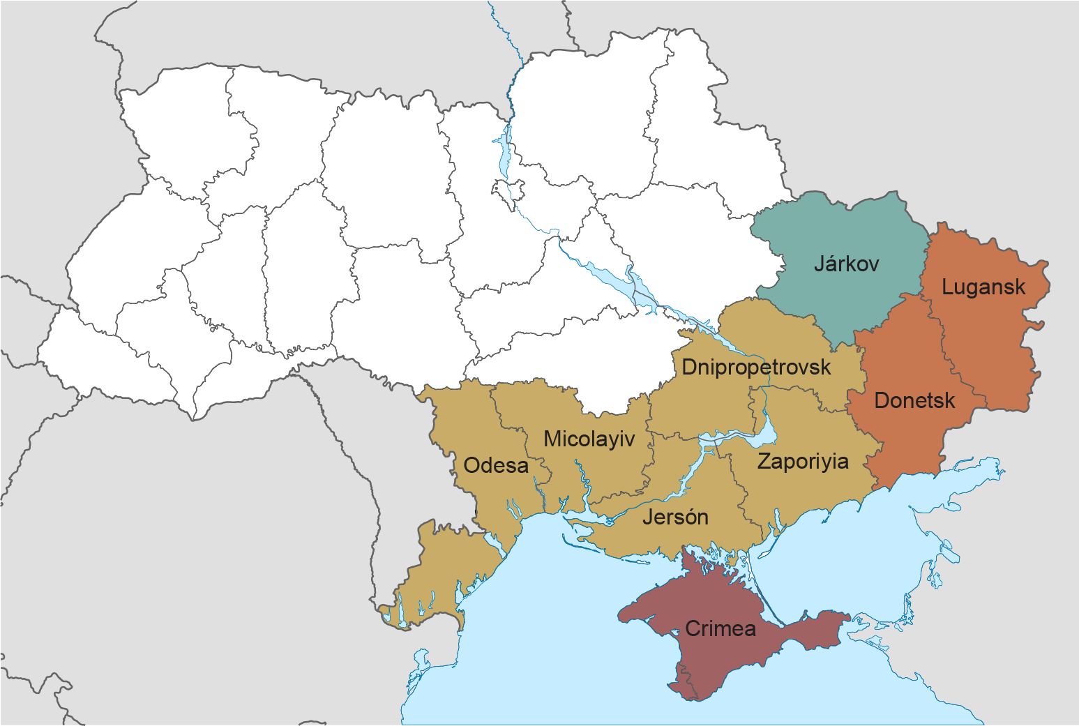 Mapa de la crisis en Ucrania de 2014. Controlado por Rusia Guerra civil Ocupación de los edificios del gobierno Manifestaciones prorrusas